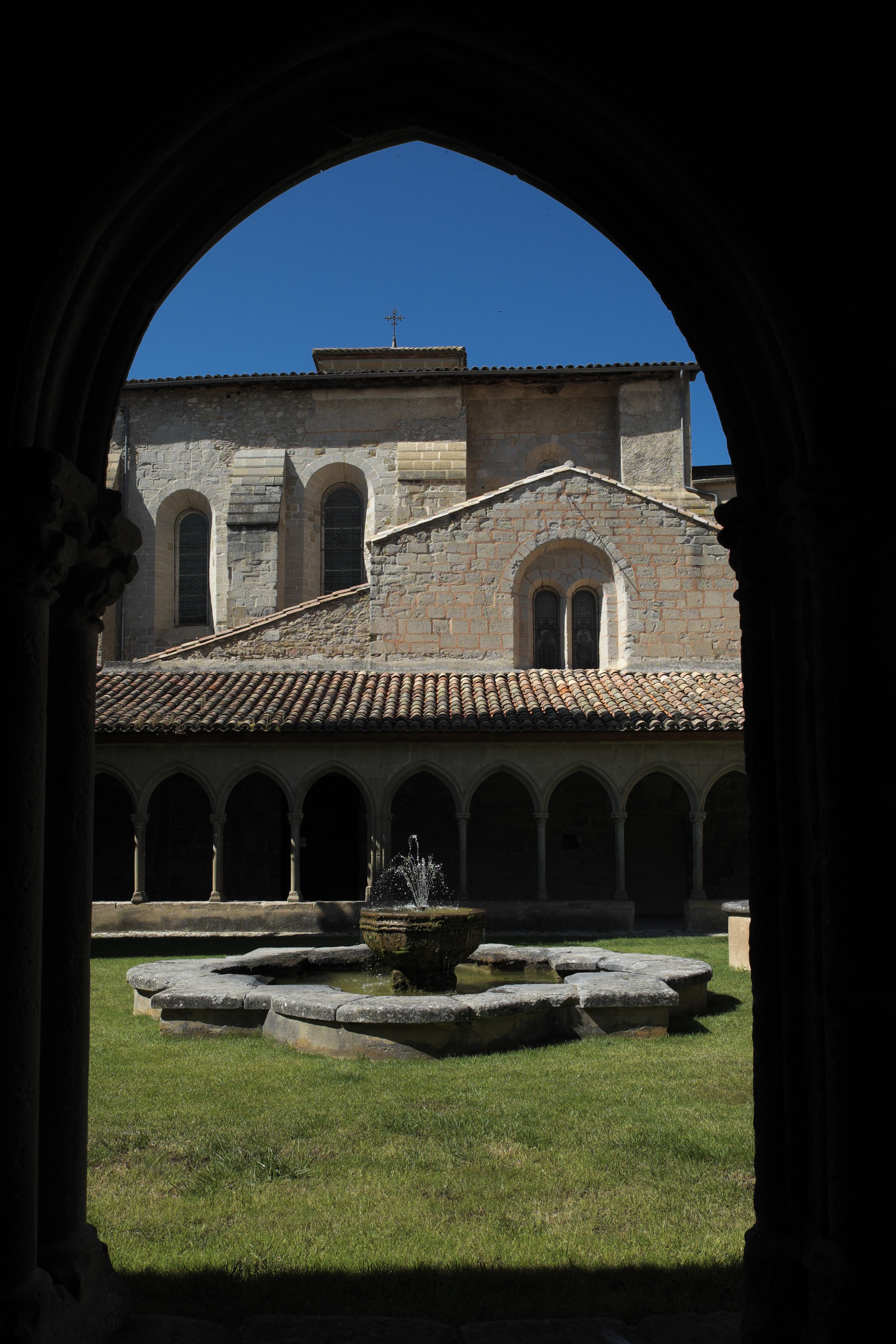 Ehemalige Abtei Saint-Hilaire in Saint-Hilaire im Département Aude (Region Languedoc-Roussillon/Frankreich), Kreuzgang